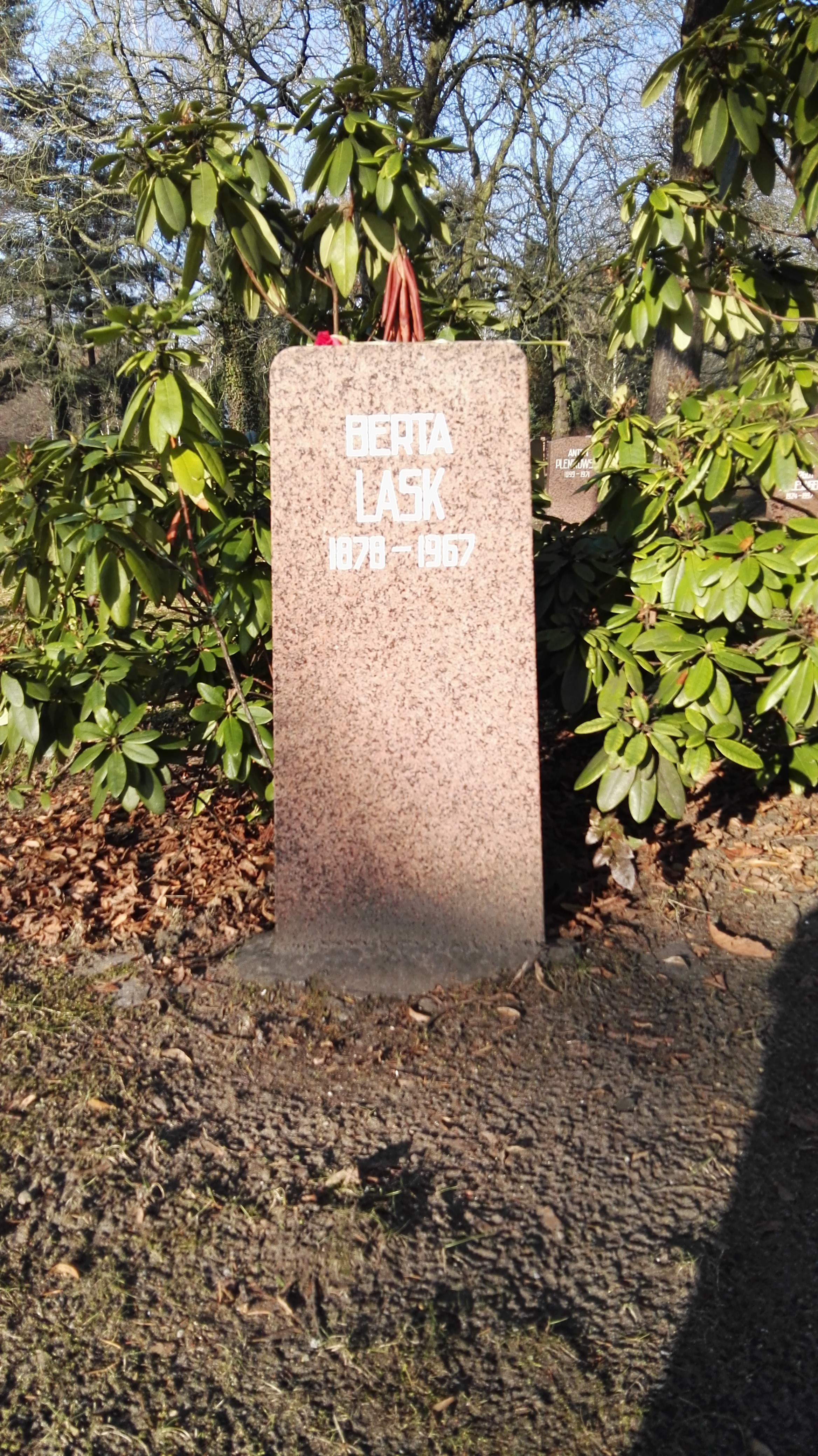 Grab von Berta Lask in der Grabanlage Pergolenweg auf dem Sozialistenfriedhof des Zentralfriedhofs Friedrichsfelde